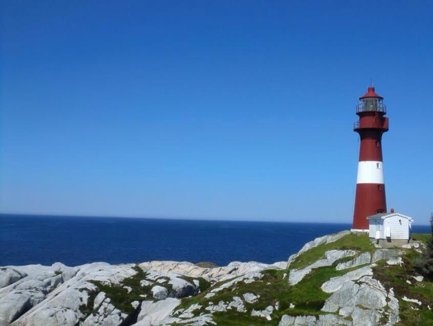 Slåtterøy fyrstasjon i Bømlo kommune